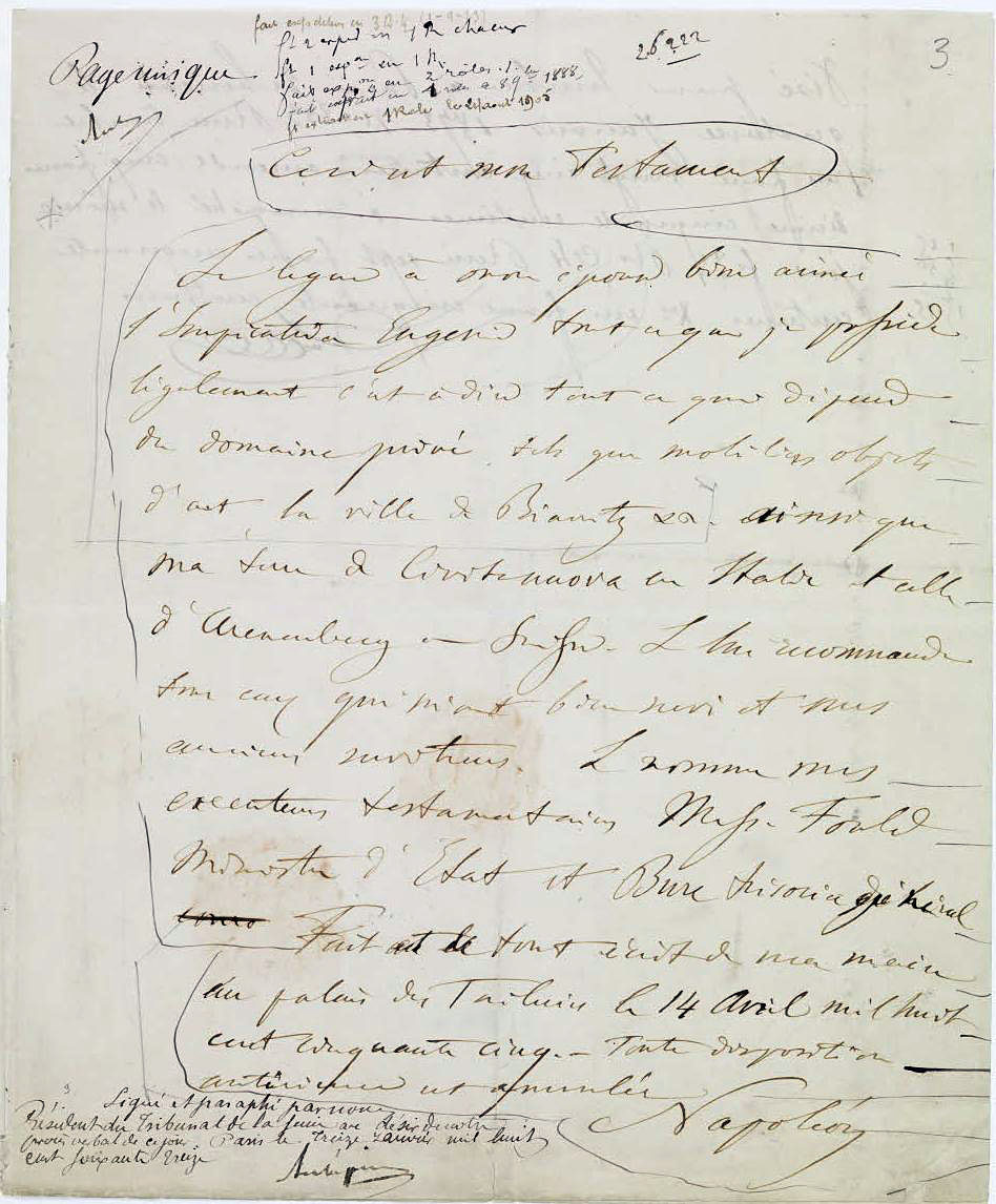 Testament olographe de Napoléon III